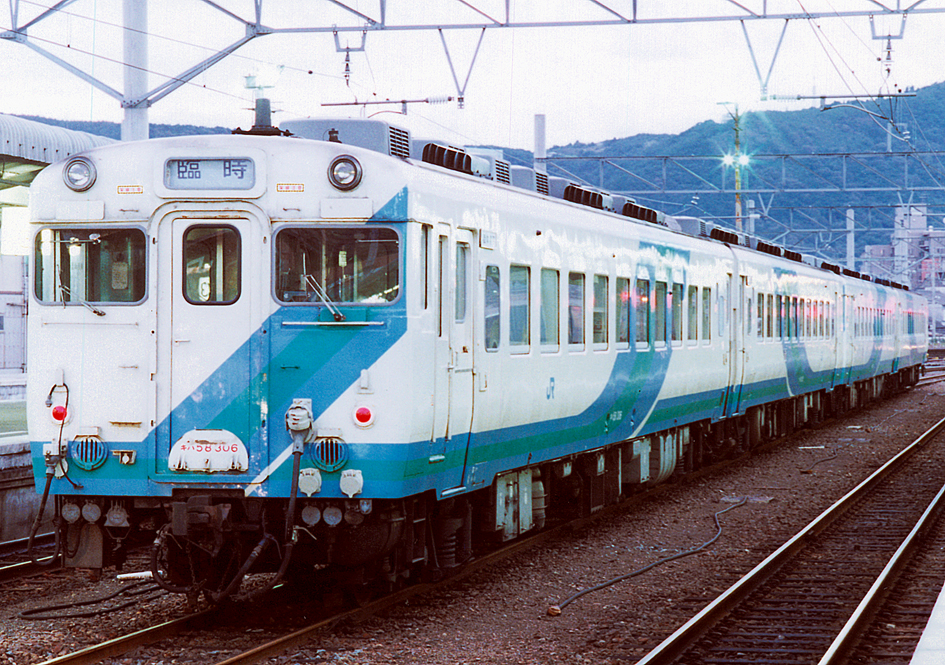 JR四国 キハ58系気動車 「旅立ち」 キハ58 306